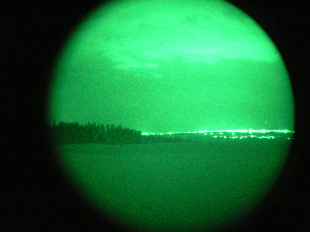 Nočné okuliare NVG - pohľad pilota z vrtuľníka